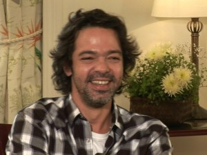 Ator brasileiro Bruno Mazzeo em imagem do acervo da TV Brasil.